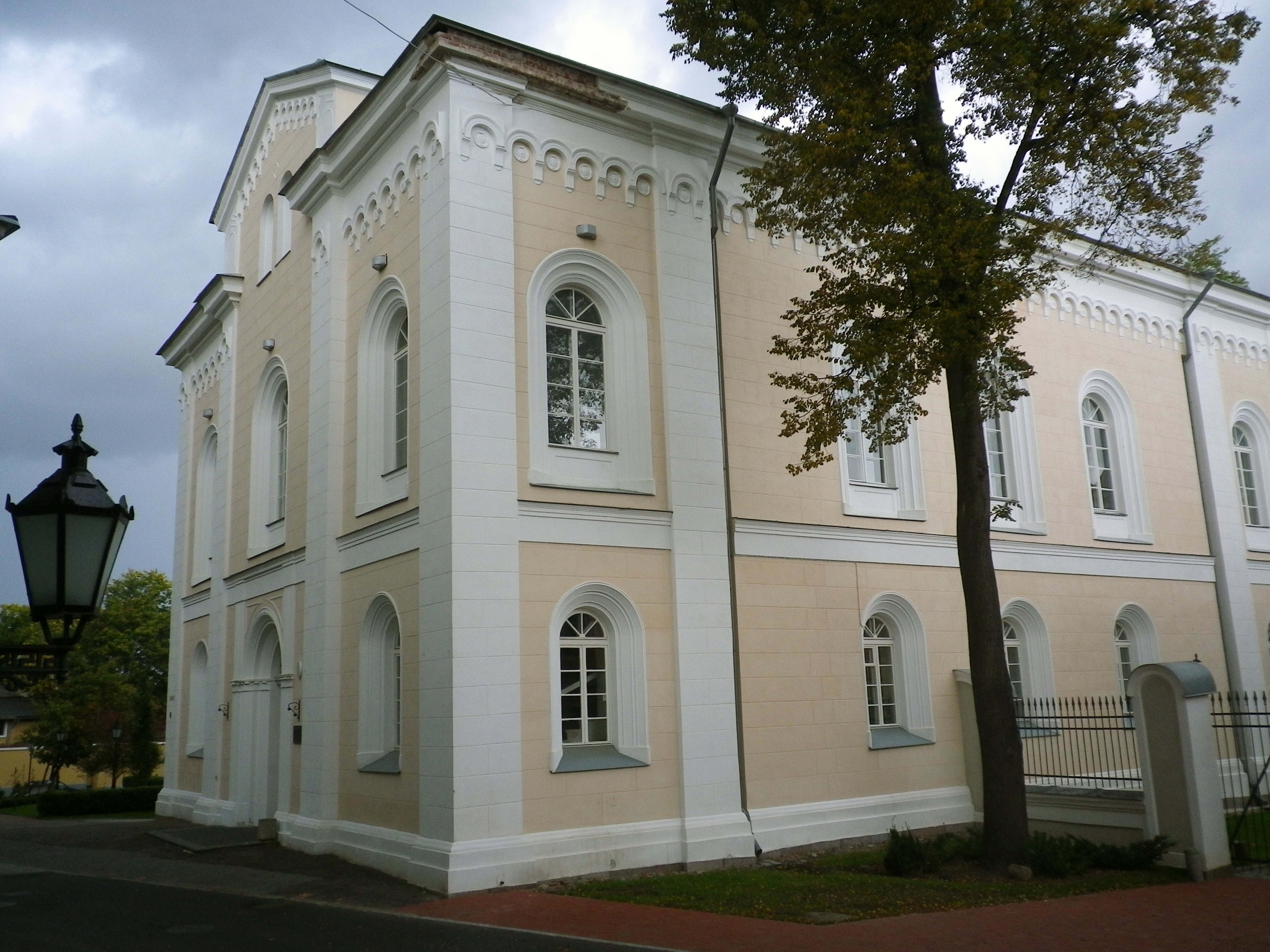 Tartu Ülikooli kirik, praegu ülikooli arhiivUnknown